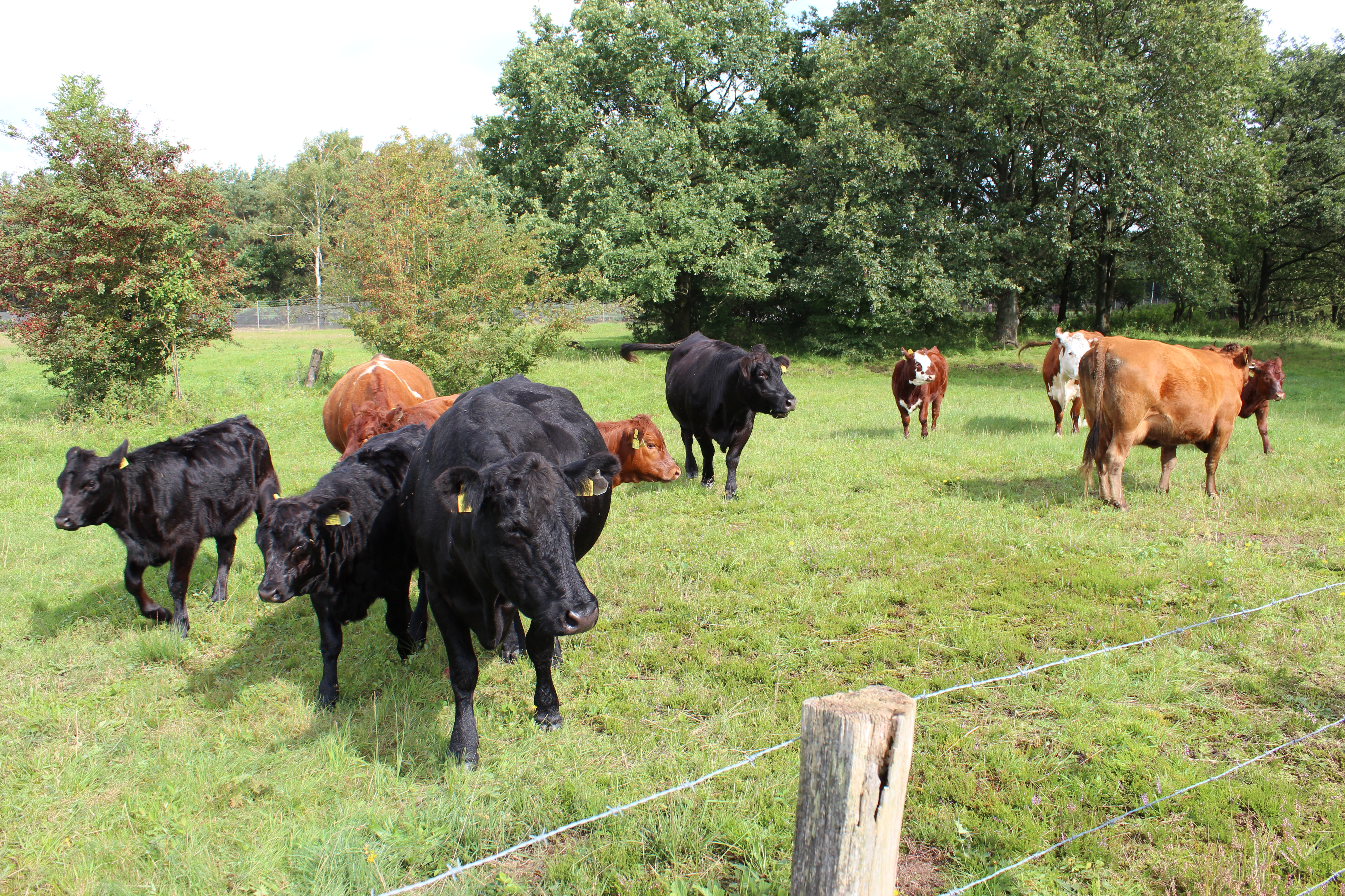 Rinderherde im Naturschutzgebiet Eispohl/Sandwehen, Bremen